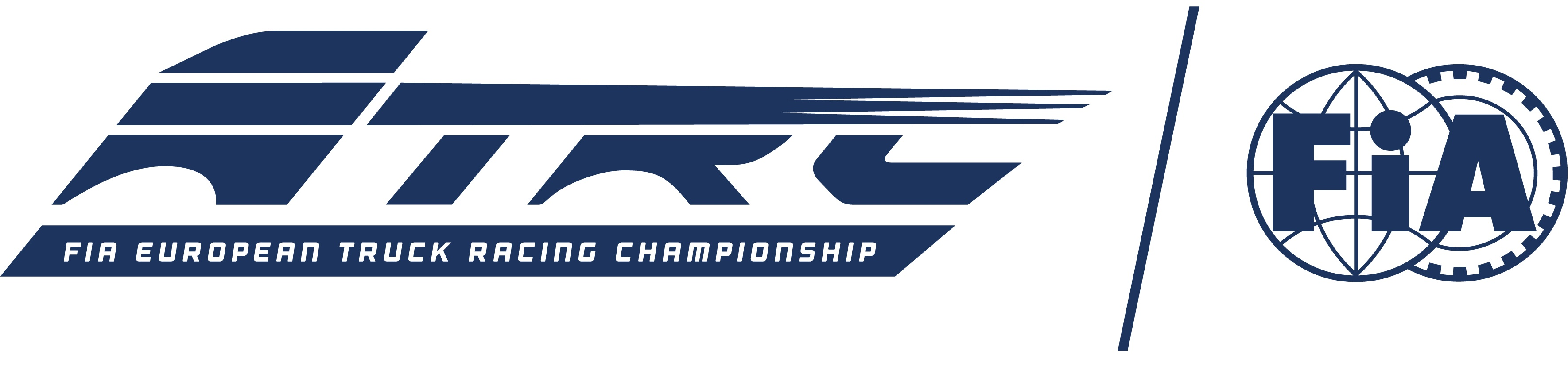 Offizielles Logo der FIA European Truck Racing Championship